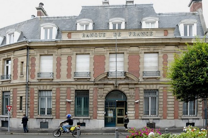 Façade principale et entrée du Lab-labanque